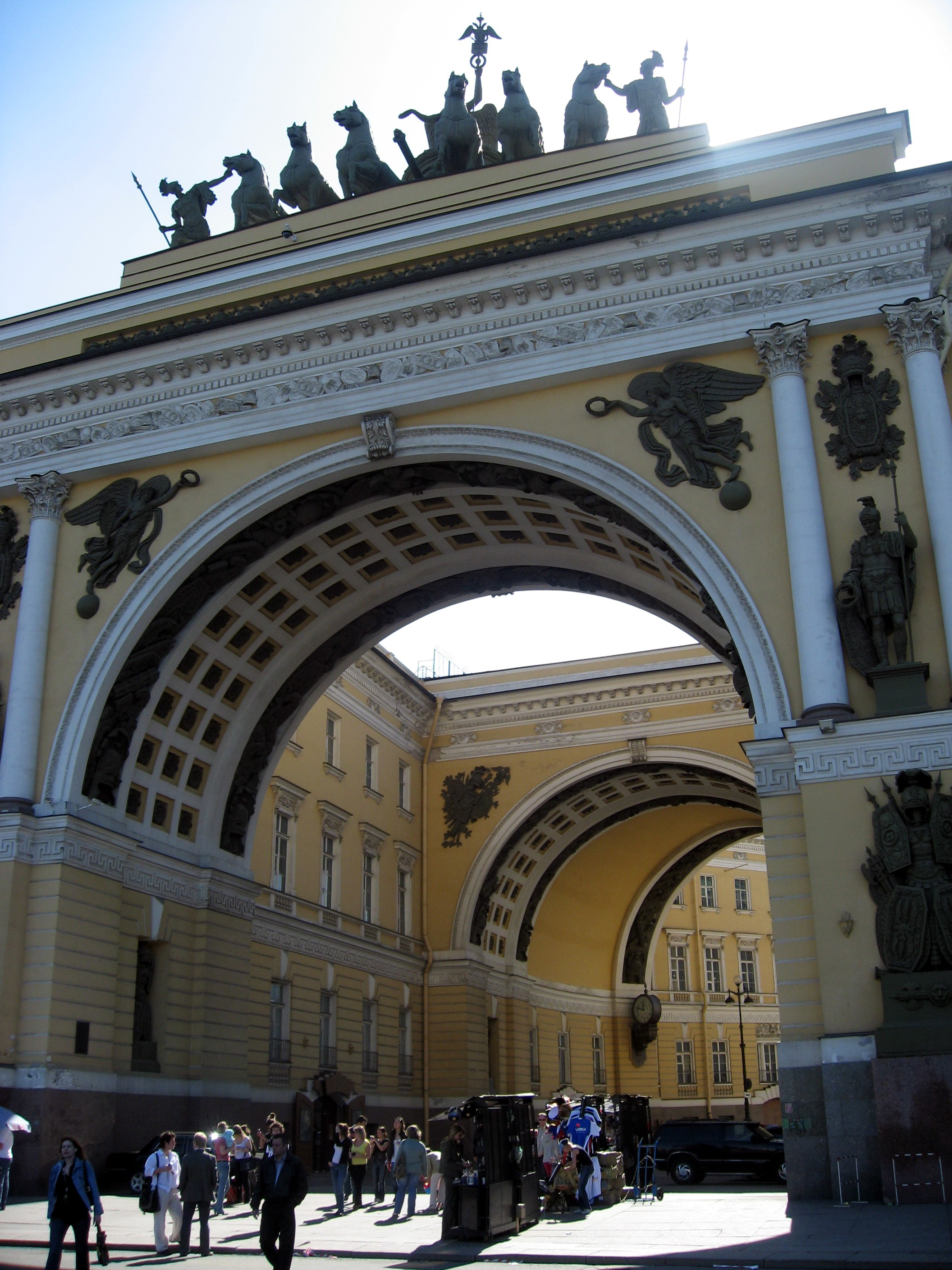 Sankt-Petěrburg